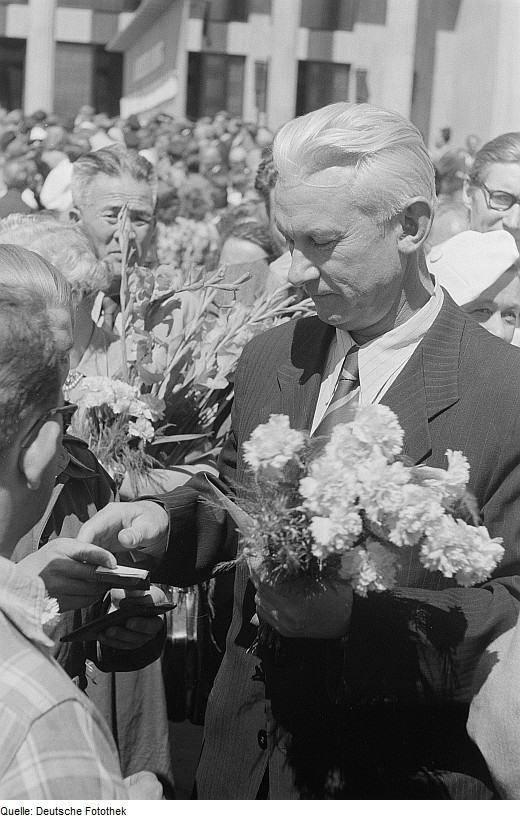 Original image description from the Deutsche Fotothek Autogrammvergabe